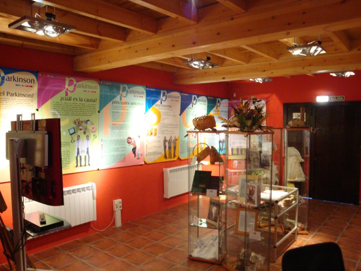 Esposición de l'Asociación Parkinson Asturias